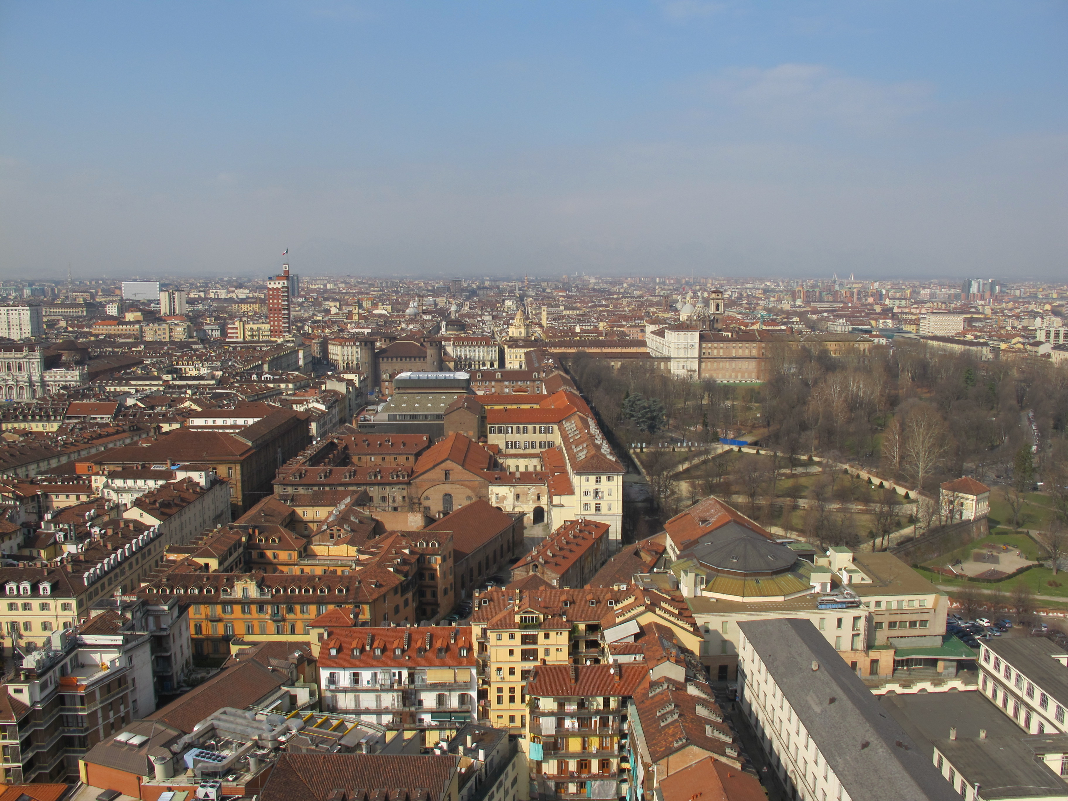 Vista di Torino dalla cima della Mole Antonelliana.